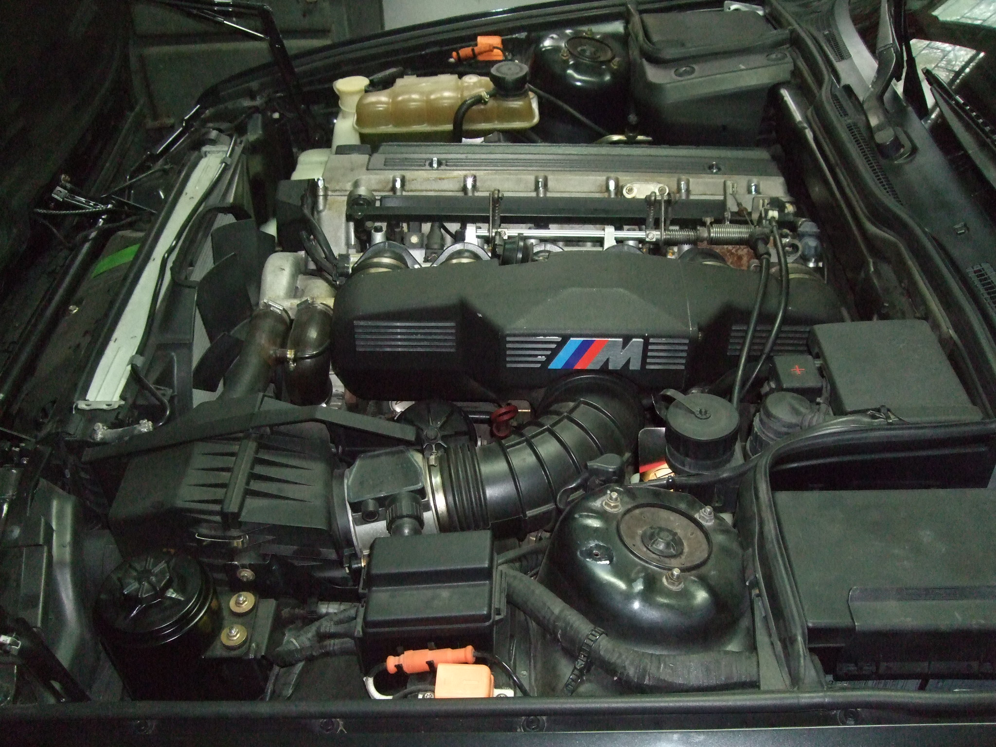 Silnik S38B38, Bmw M5 e34.